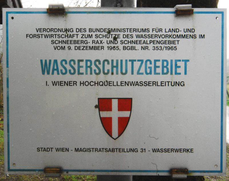 Tafel über Wasserschutzgebiet der I. Wiener Hochquellenwasserleitung bei Naßwald in Niederösterreich